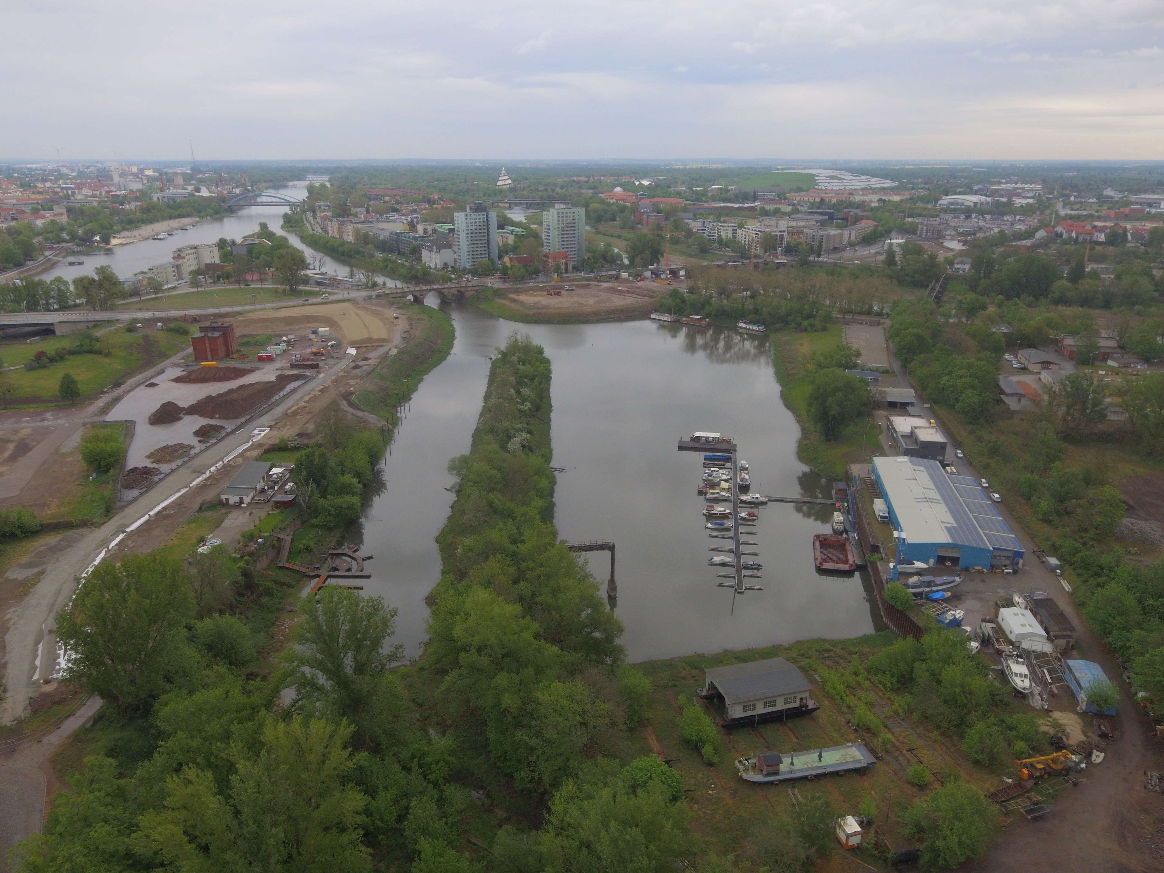 Zollelbe im Luftbild von Süden